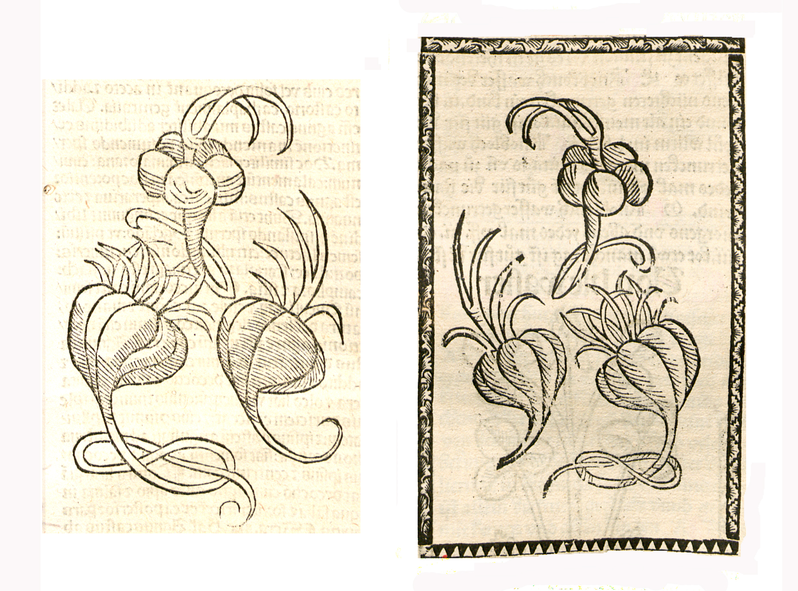 Abbildung von Knoblouch (Allium sativum)